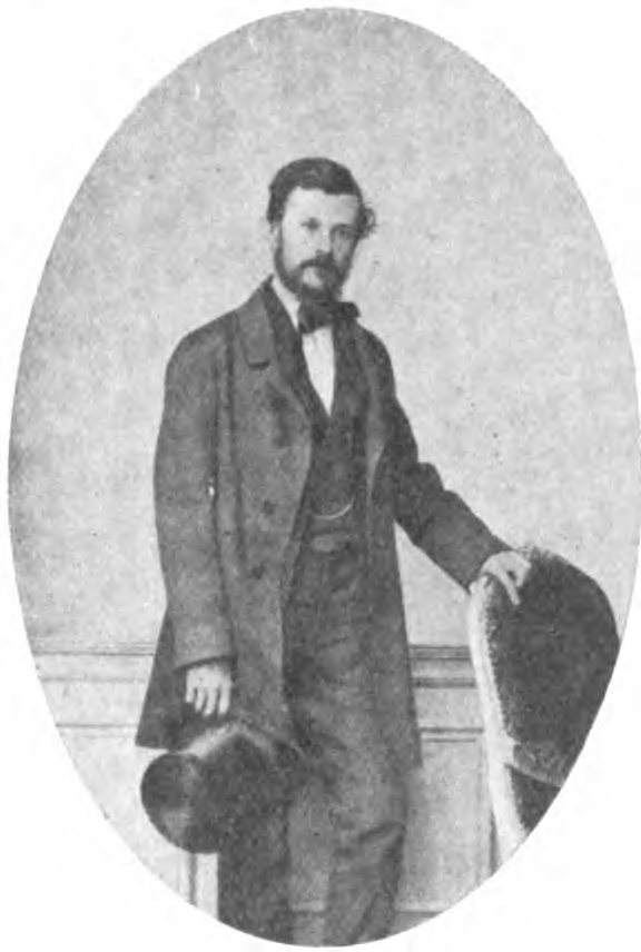 Portrait de François-Émile Ehrmann dans Une famille de républicains fouriéristes : les Milliet de Paul Milliet (Q3371845), premier volume, page .